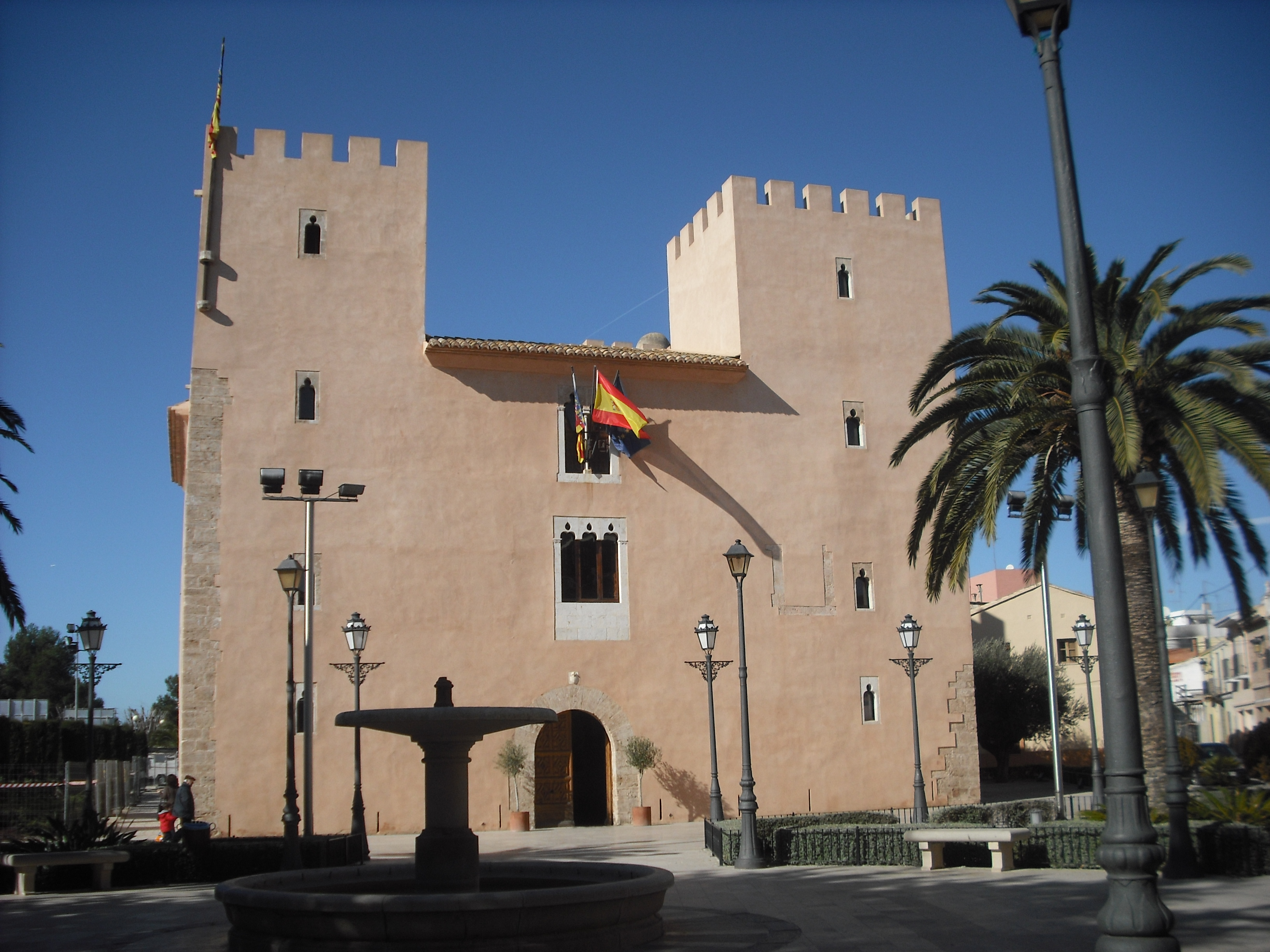 Façana est (principal) castell d'Albalat dels Sorells, seu de l'ajuntament.